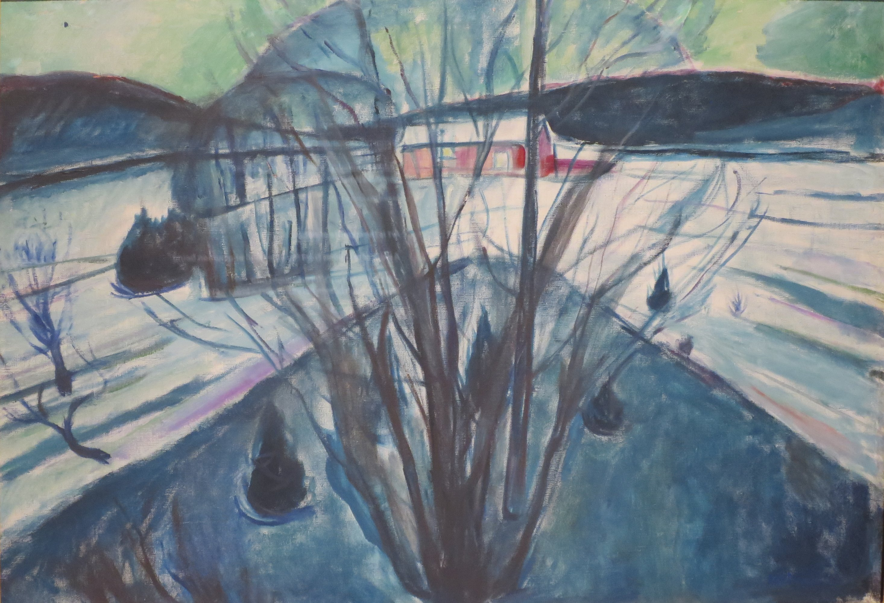 Winter Night, Ekely